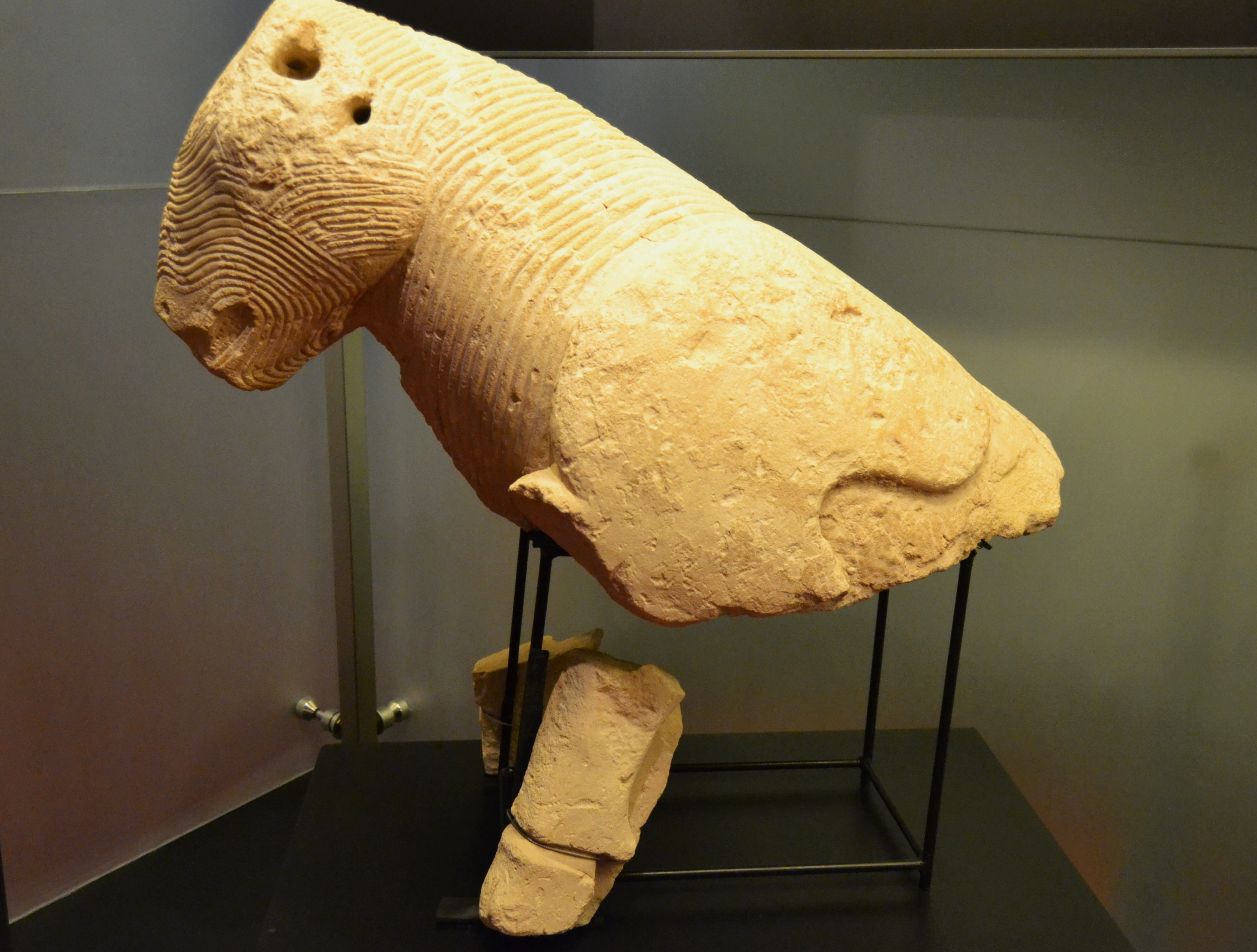 Bou del Parc d'Elx, museu Arqueològic i d'Història, Elx. D'una cronologia similar al grup de l'esfinx, es conserva la part superior d'un bòvid i fragments de les seues potes davanteres, el primer esculpit en un ple volum i les potes en alt relleu, potser per constituir els extrems de receptacle que formà la seua base. El cos, per la seua banda, va configurar l'urna cinerària, en estar buida per dins. L'animal està idealitzat, amb boca entreoberta mostrant les dents, cap i coll coberts per un estriat pronunciat, ulls ametllats amb pestanyes llargues i testera amb serrell. Té orificis per inserir-hi orelles, banyes i musell i el seu llom mostra les escàpules molt marcades, semblants a unes aletes. El seu aire geomètric és obvi, sent un producte arcaic típic.